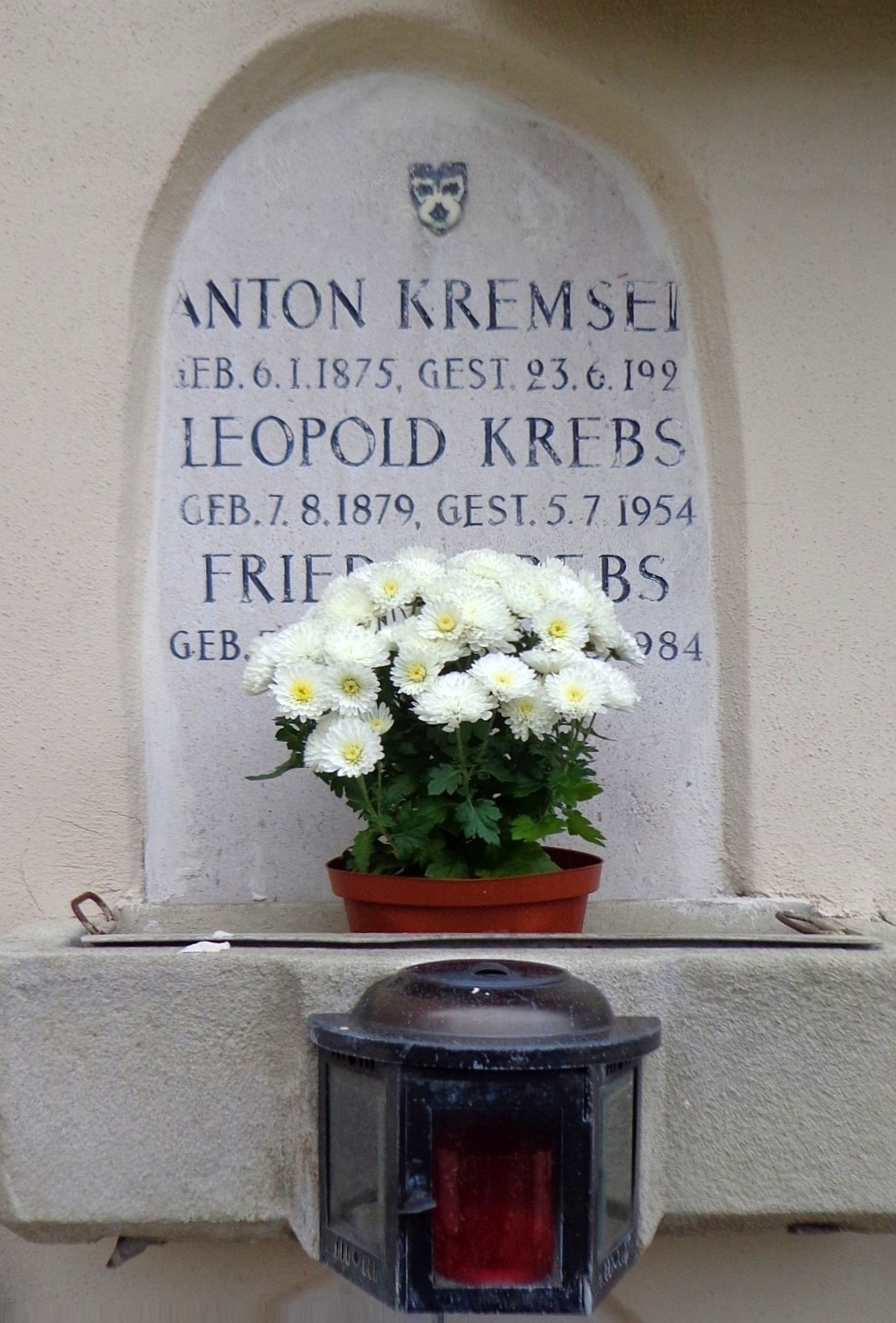 Feuerhalle Simmering - Abteilung MR (Umfassungsmauer): Urnengrab der Familien Kremser und Krebs mit dem Stiefmütterchen als Symbol der österreichischen Freidenkerbewegung